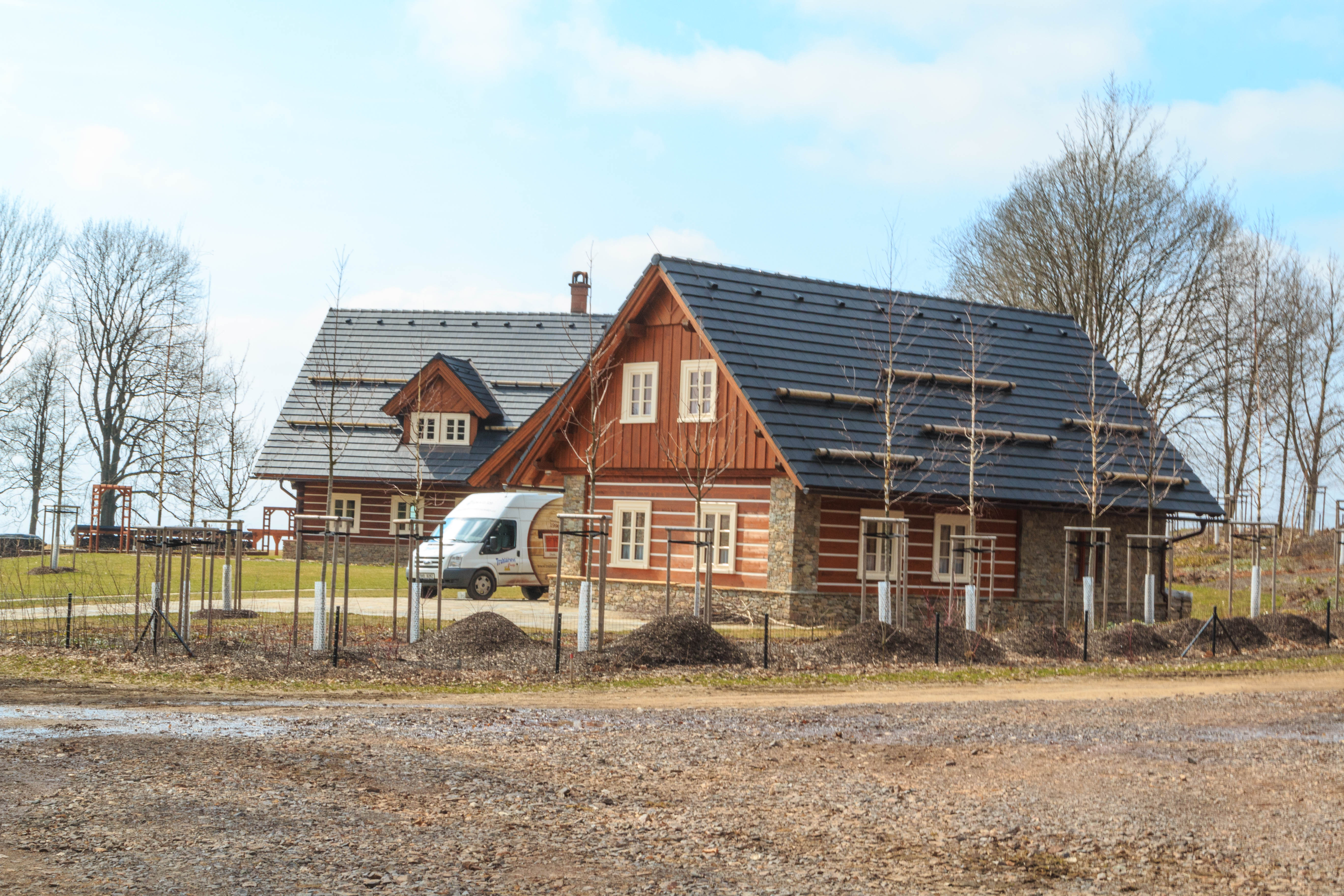 Rampuše - čp. 10